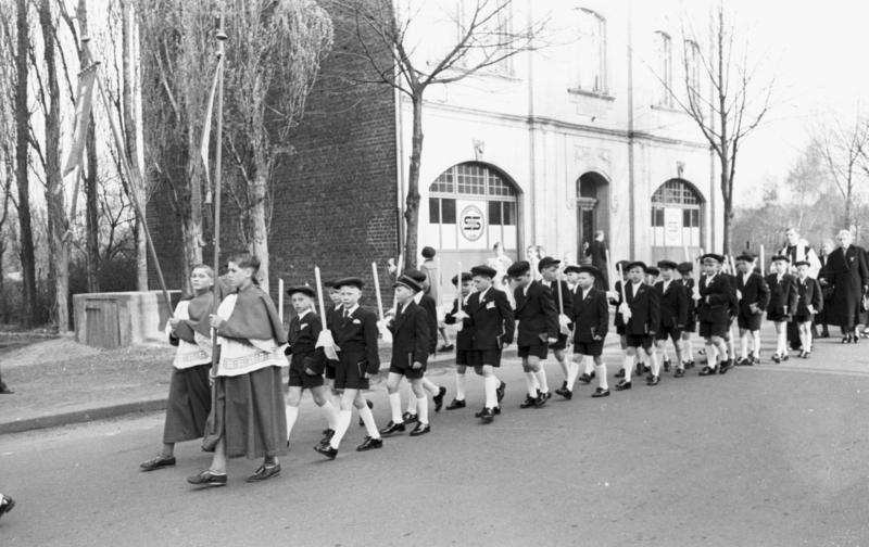 Kommunion